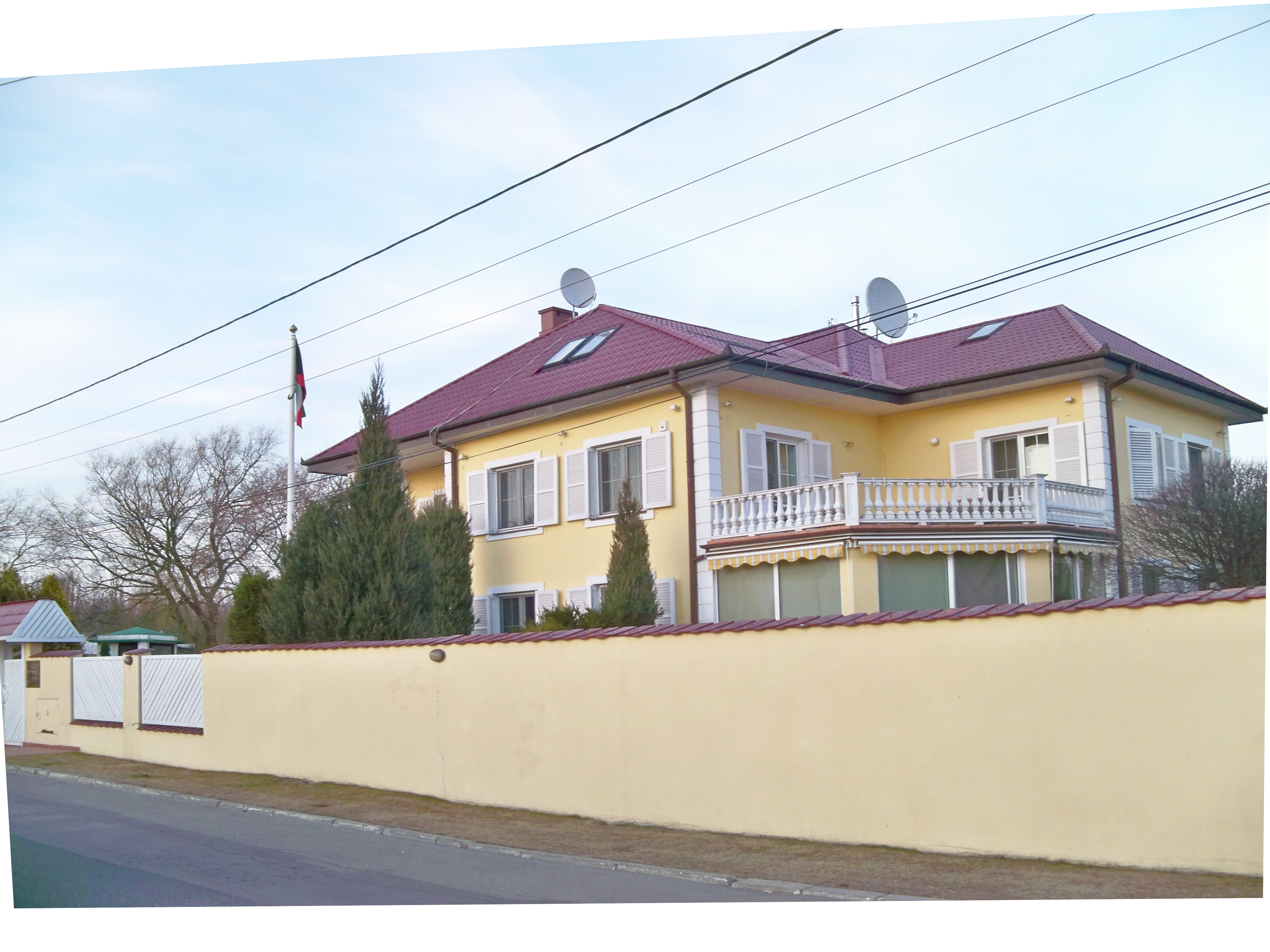 Ambasada Kuwejtu w Warszawie, placówka przy ul. Usypiskowej 14, od 2017 r. przedszkole muzyczne Piotra Rubika